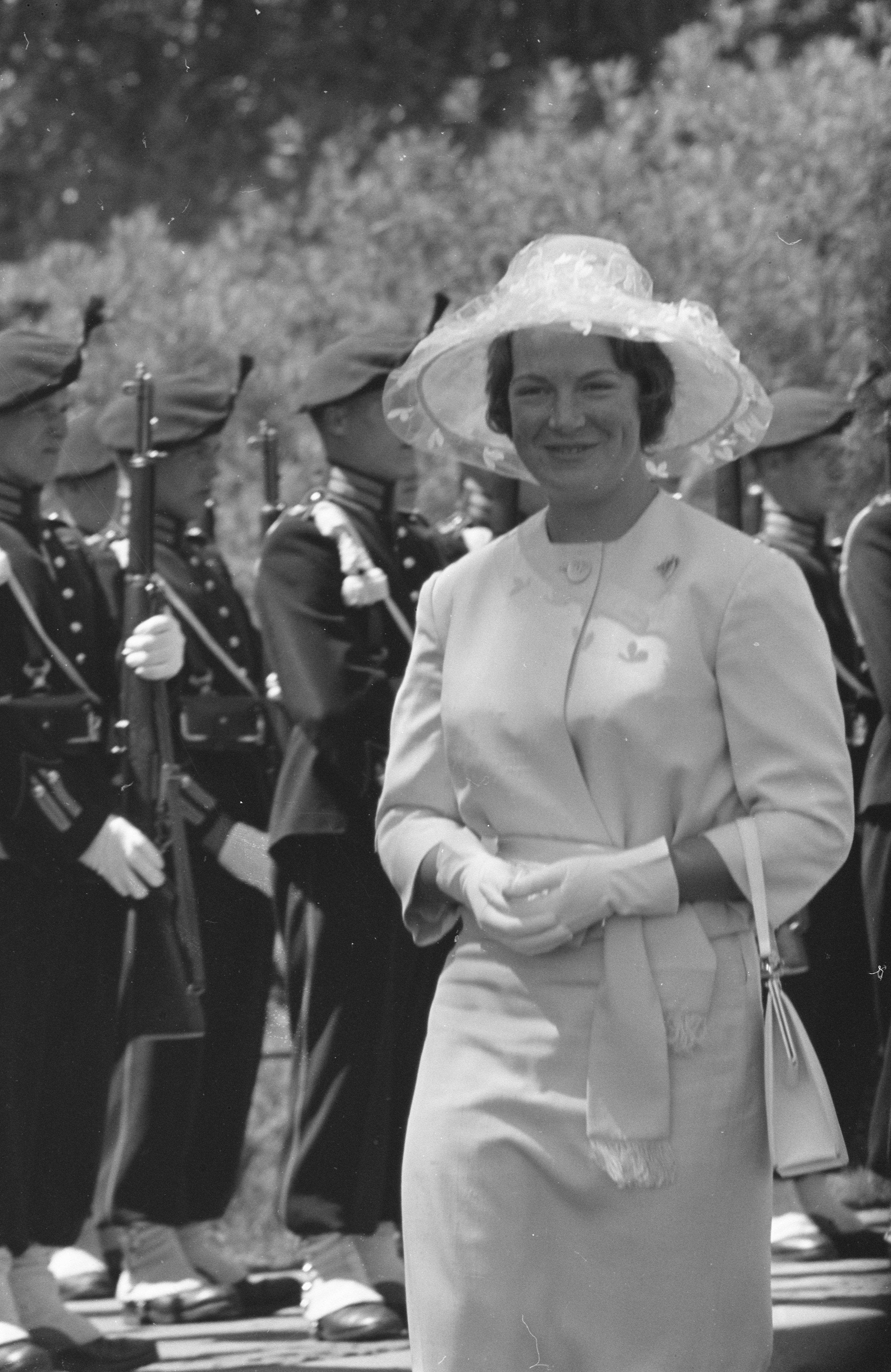 Collectie / Archief : Fotocollectie Anefo Reportage / Serie : [ onbekend ] Beschrijving : Prinses Irene bij 130-jarig bestaan van garderegiment Grenadiers Datum : 7 juli 1959 Trefwoorden : koninklijk huis, militairen, prinsessen Persoonsnaam : Irene, prinses Fotograaf : Pot, Harry / Anefo Auteursrechthebbende : Nationaal Archief Materiaalsoort : Negatief (zwart/wit) Nummer archiefinventaris : bekijk toegang 2.24.01.05 Bestanddeelnummer : 910-4982